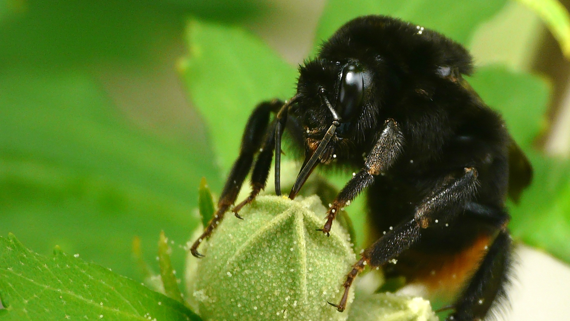 Bombus ignitus